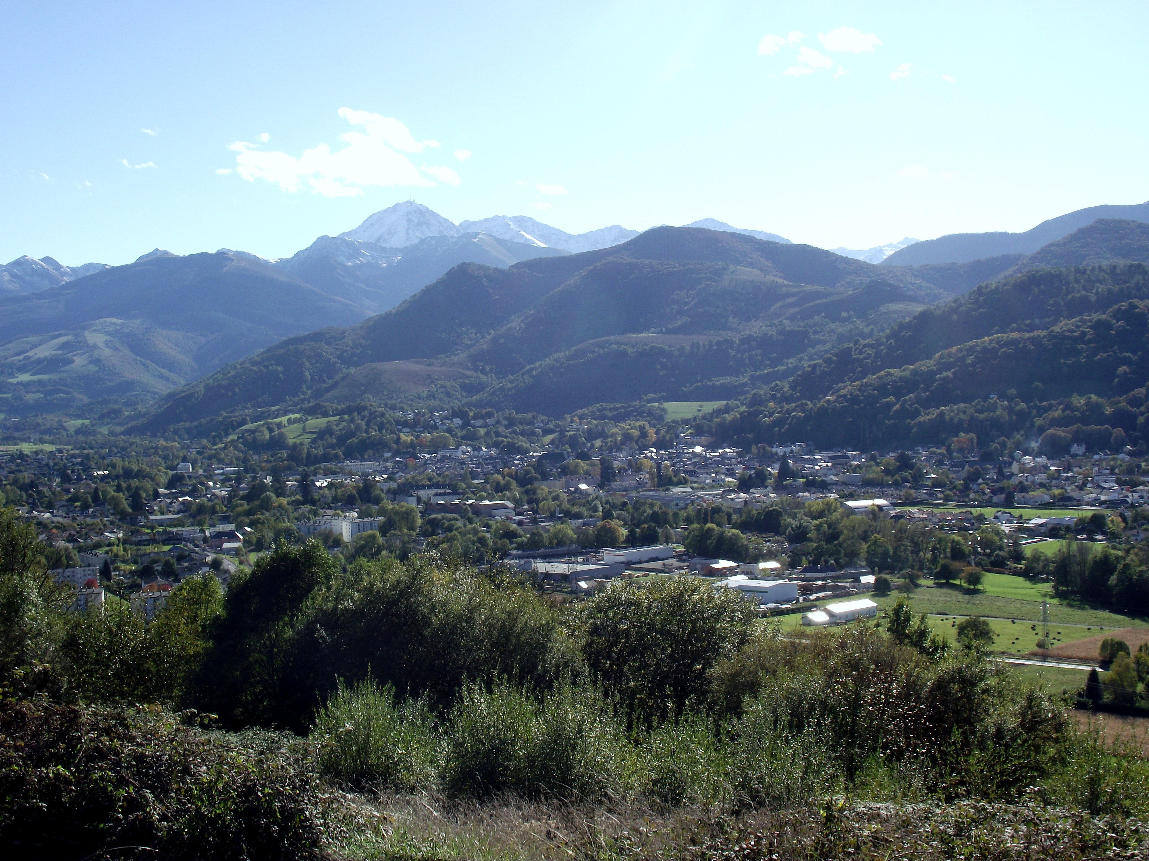 Bagnères-de-Bigorre — Hautes-Pyrénées.